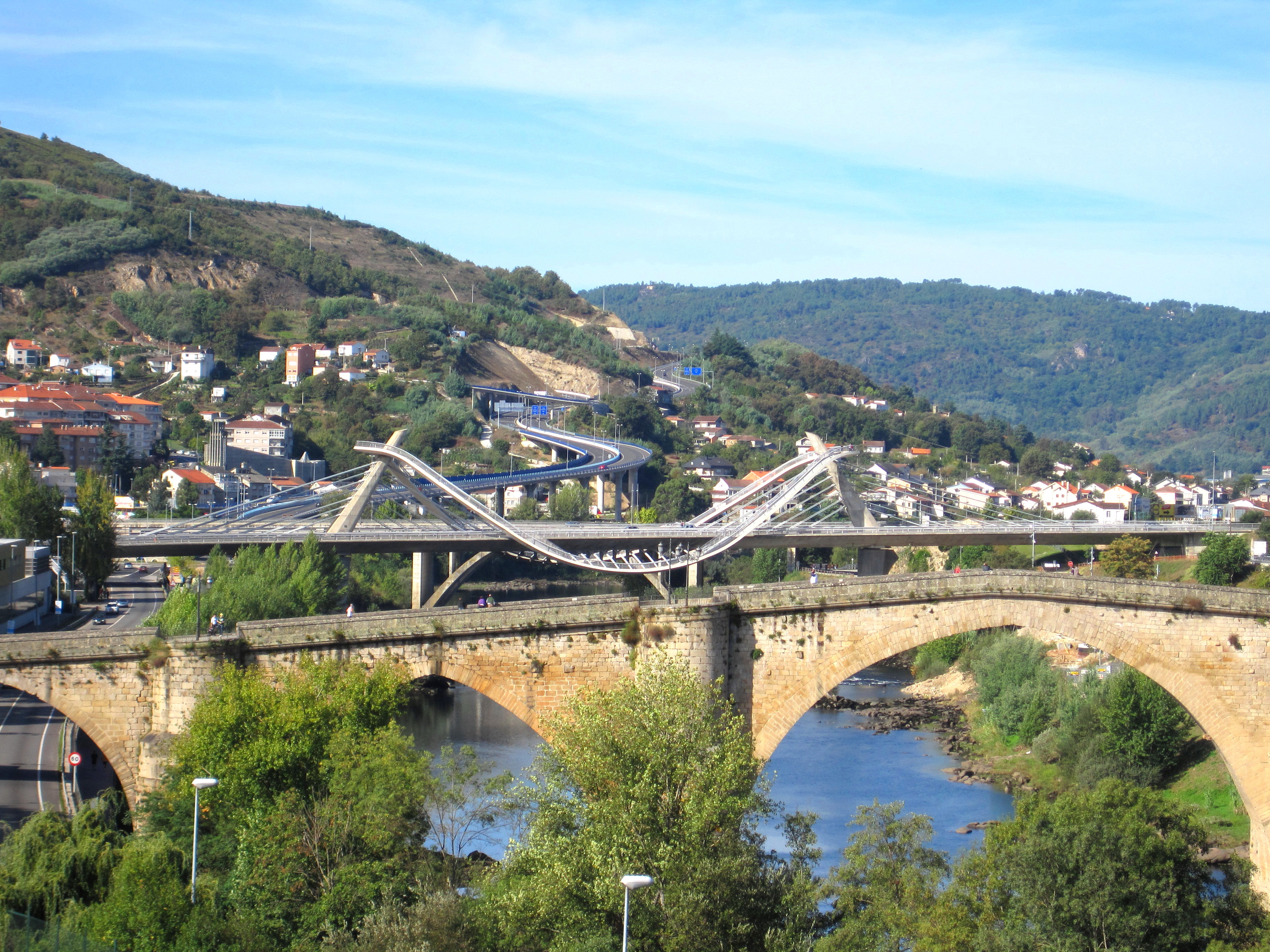 Puente Romano y Puente del Milenio. Orense.